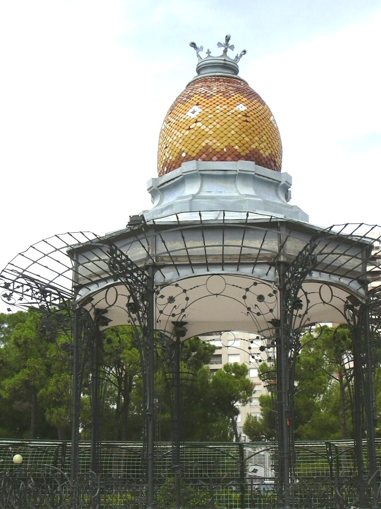 Zaragoza - Parque Grande Quisco de música modernista (1908) de José y Manuel Martínez de Ubago